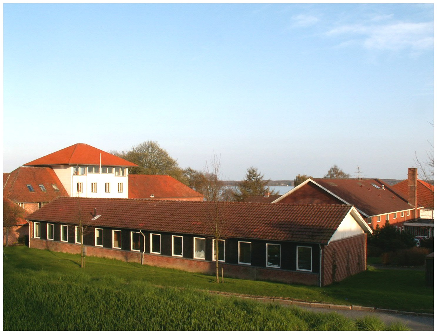 Rønshoved Højskole ligger ud til Flensborg Fjord med udsigt til Sydslesvig